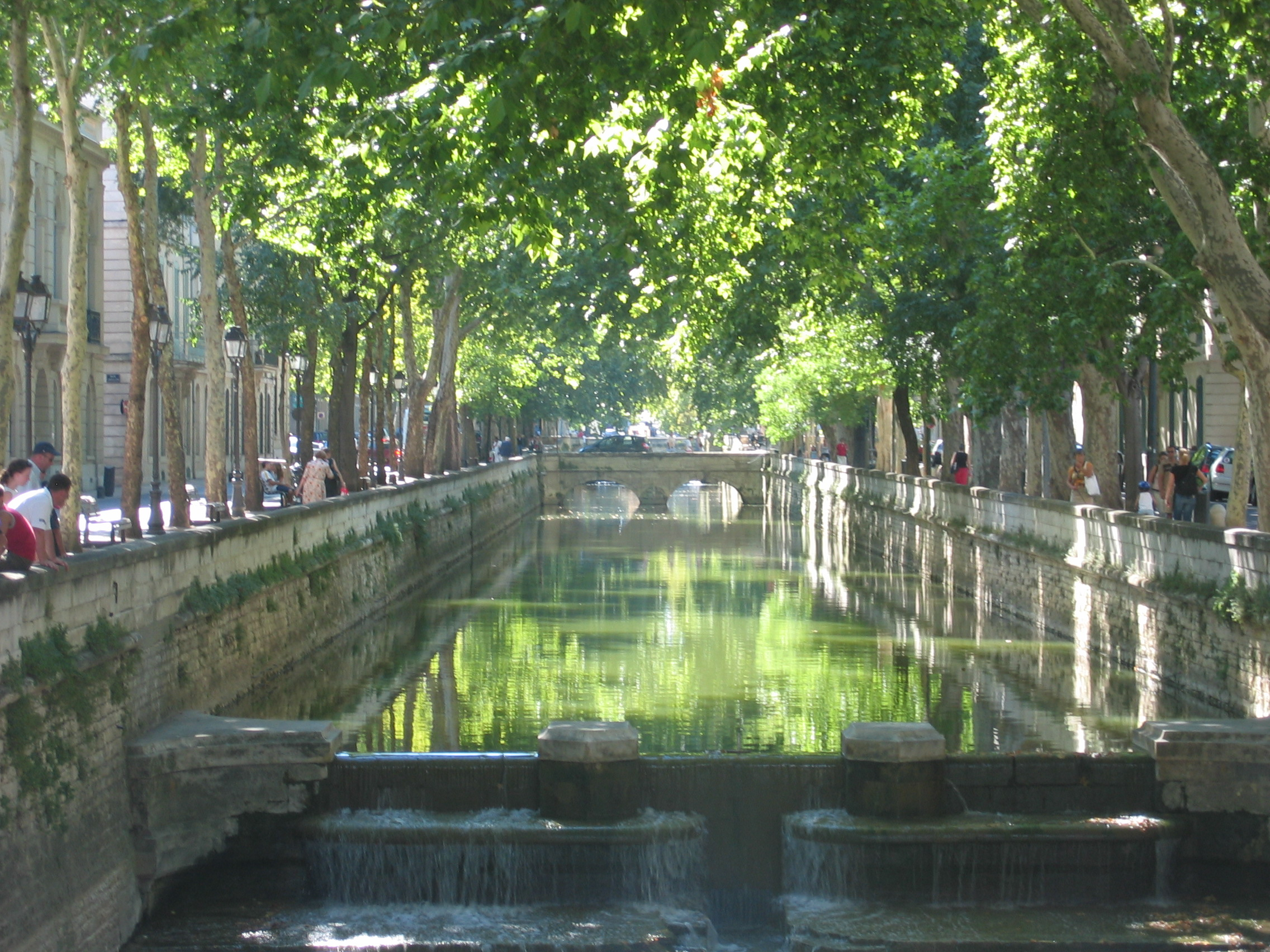 Les Quais de la Fontaine (Nîmes) , photo personnelle de Nicolas Cadène